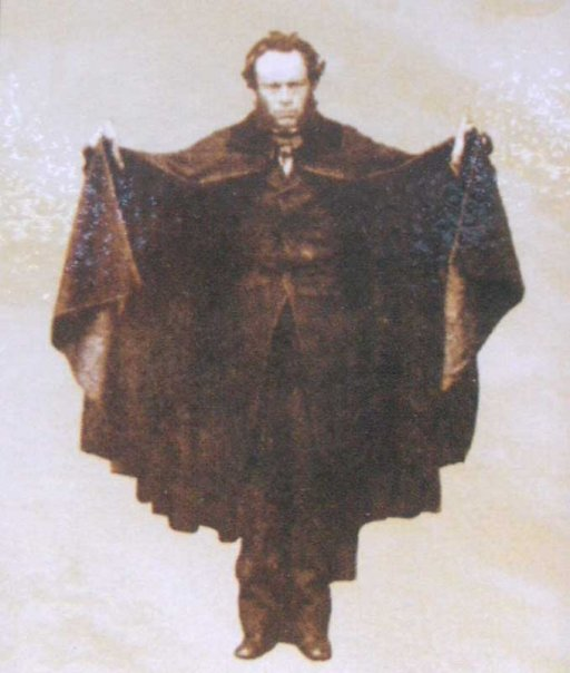 Manuel Atanasio Fuentes Delgado (* Lima, 2 de mayo de 1820 - † 2 de enero de 1889).